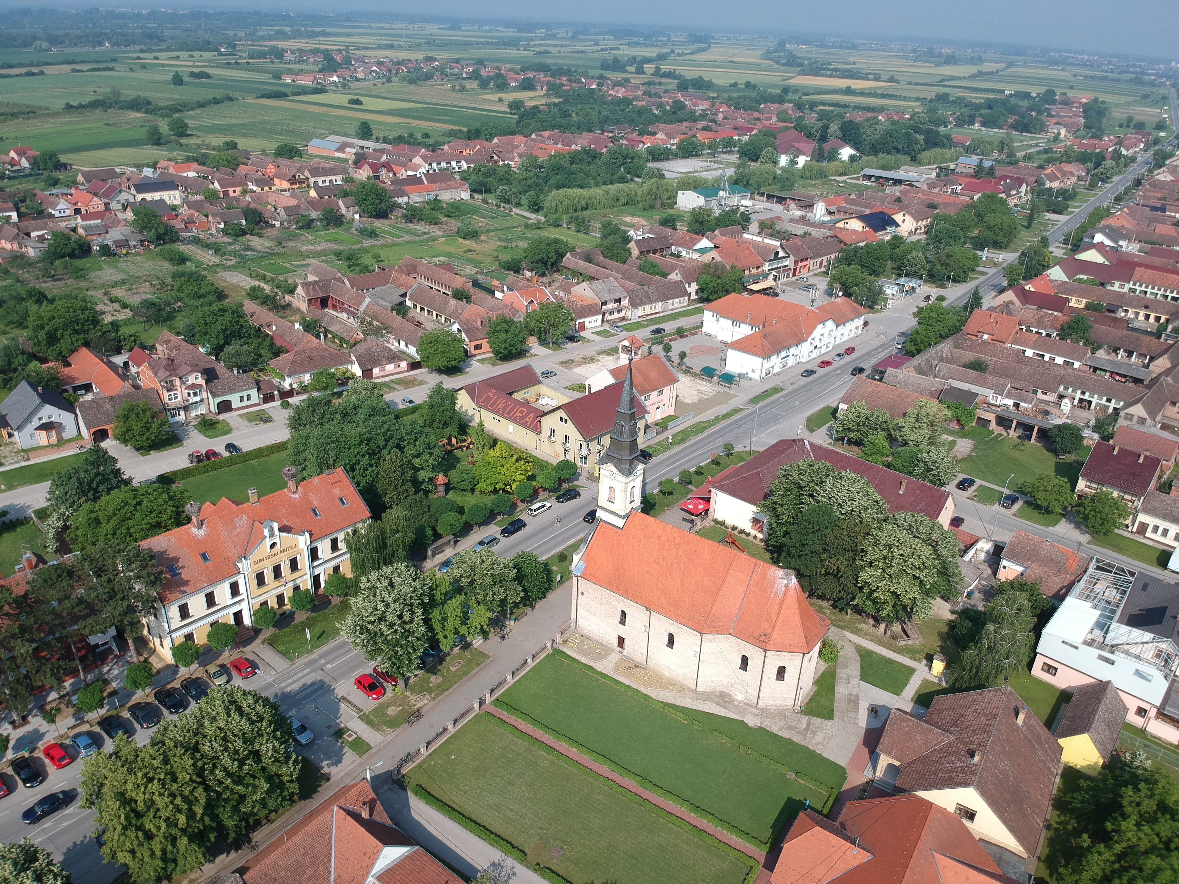 Crkva i Šumarski muzej